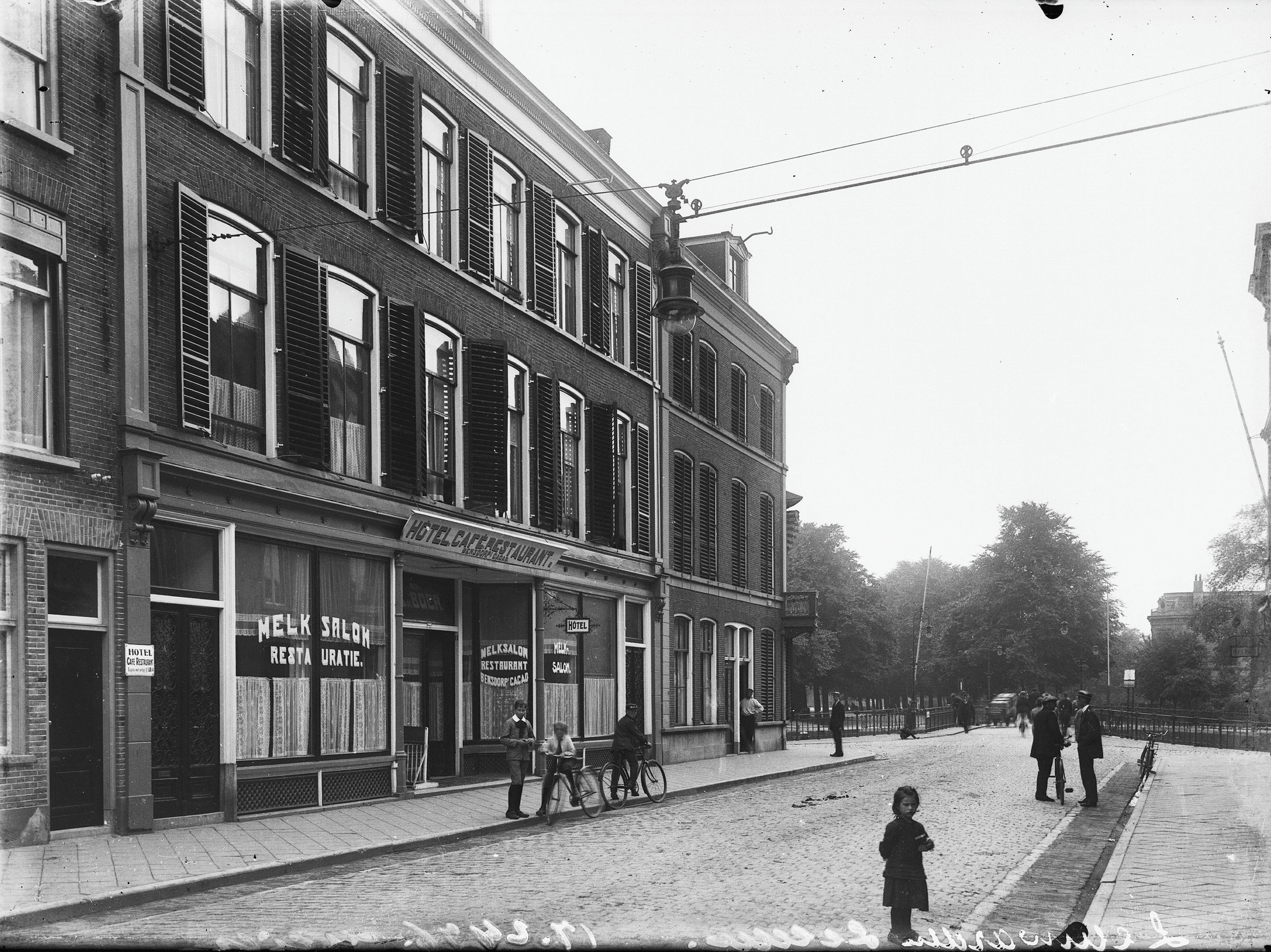 overzicht